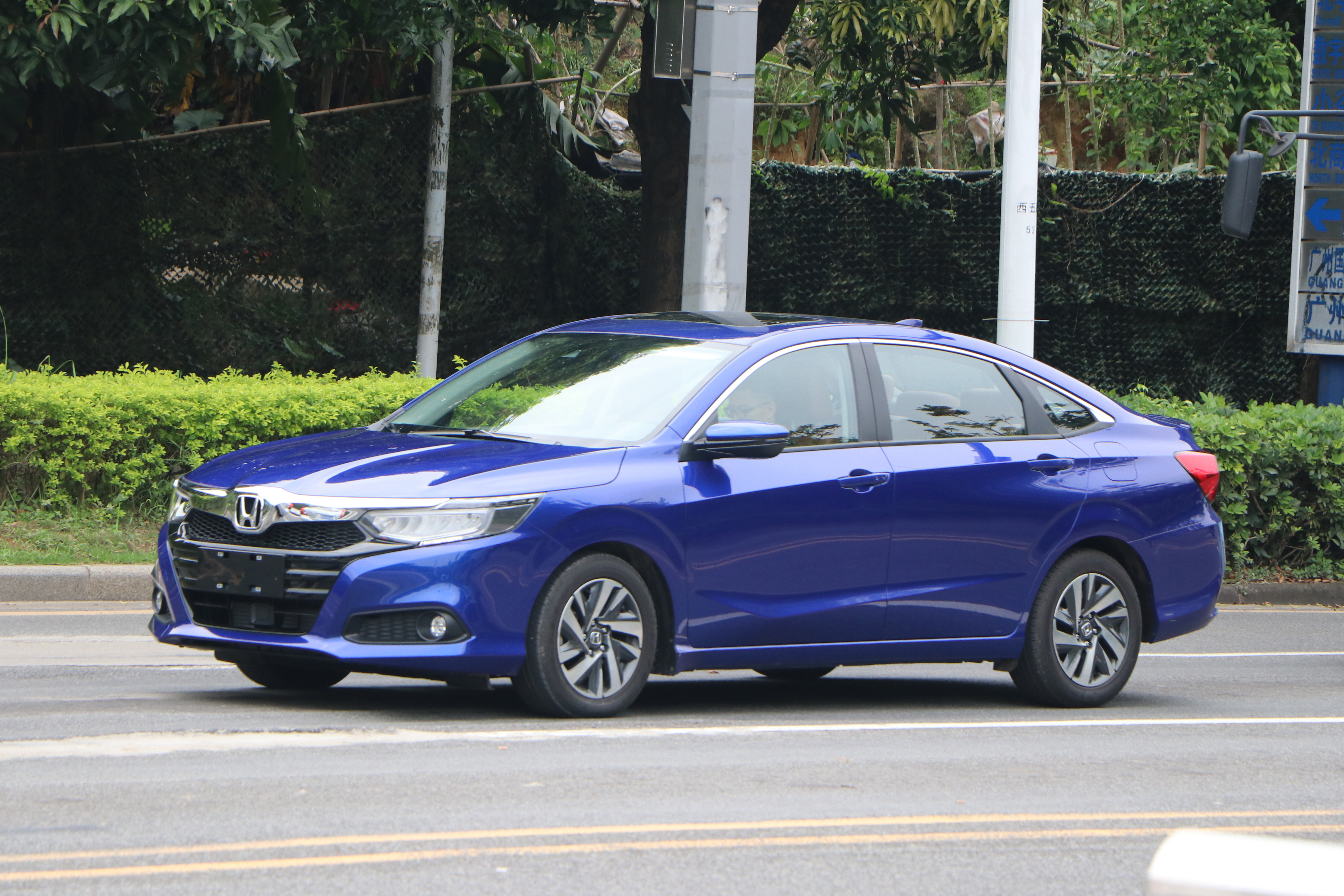 广汽本田凌派